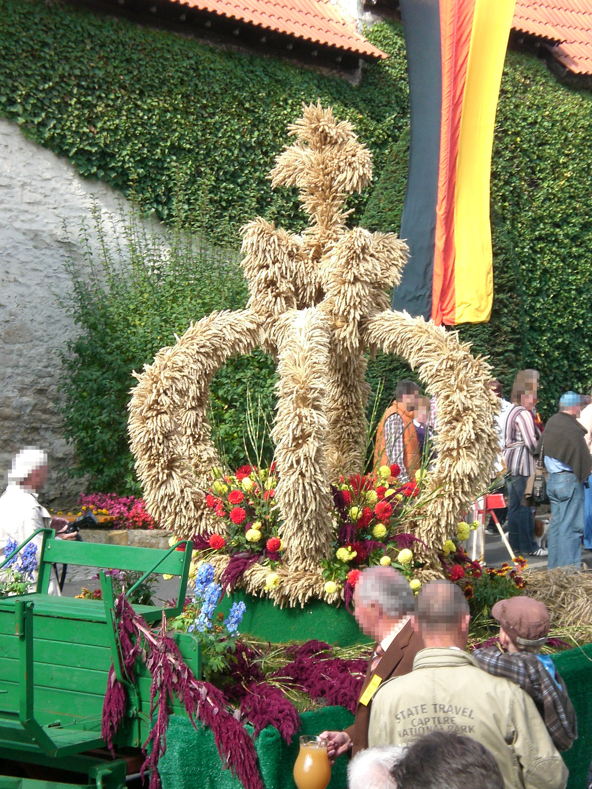 Erntekrone Erntedankfest 2007